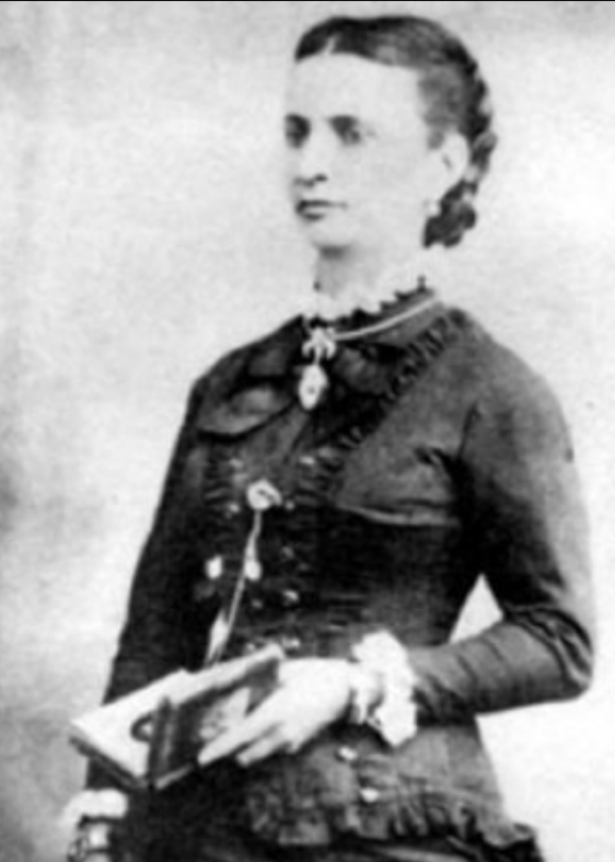 Nísia Floresta